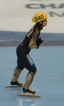 Чемпионат мира по шорт-треку 2015 в Москве Квалификационный раунд, 6 забег, 1000 м, Женщины